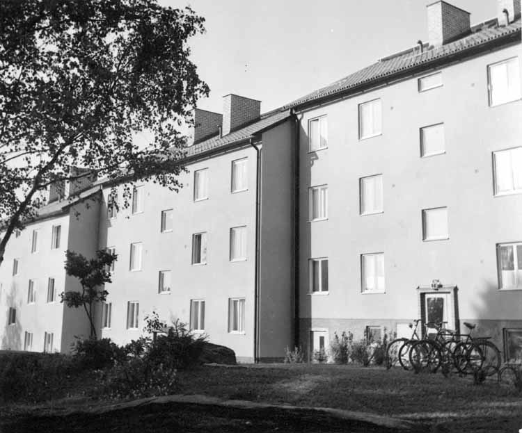 Kallhäll, Järfälla kommun, kvarter Trehörningen, 1950-talet.